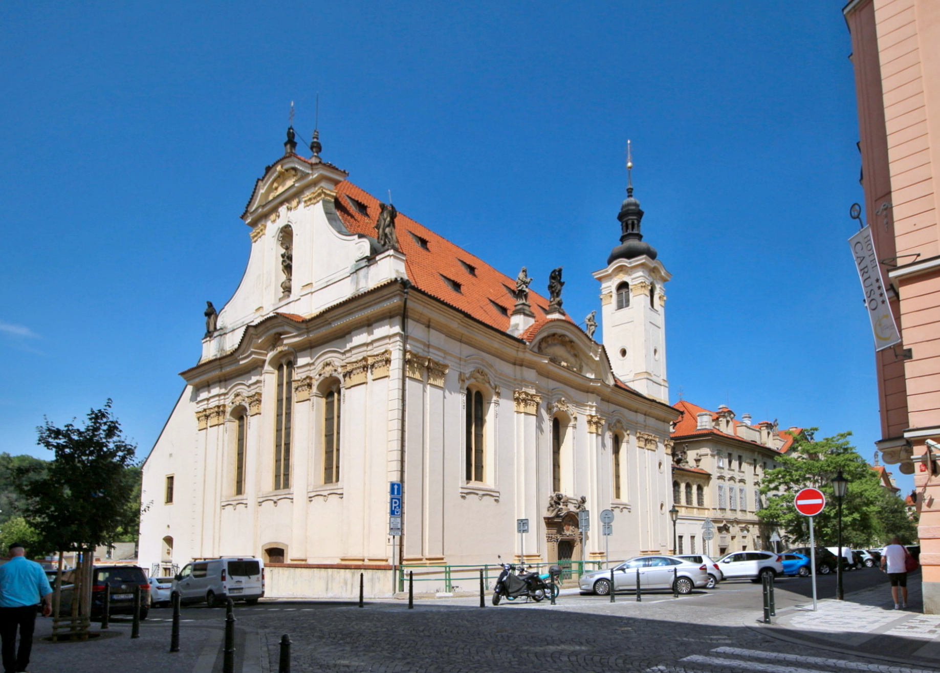 Kostel svatých Šimona a Judy Na Františku